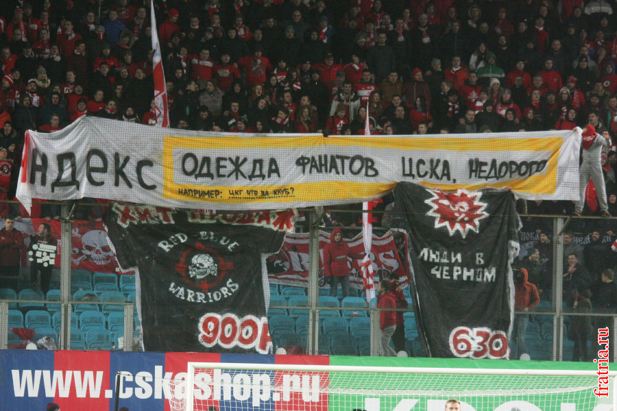 Перформанс на выездном матче с ЦСКА: "Одежда фанатов цска. Недорого". Сезон 2015/16 годов